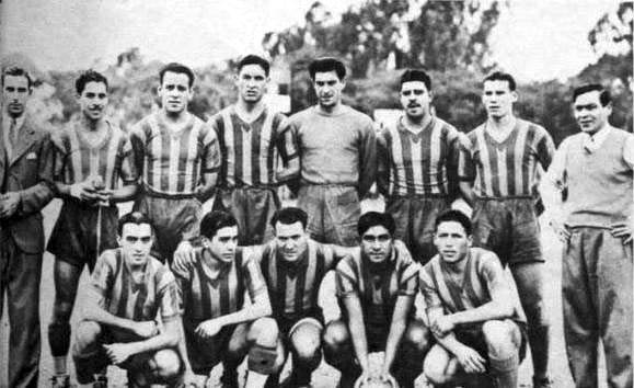 Formación que disputó el primer clásico ante Newell's por torneos de Primera División de AFA, el 18 de julio de 1939. Parados: Héctor Vidal, Raúl Martínez, Claro Rivero, Pedro Aráiz, Ignacio Díaz, Alfredo Fógel y Gerardo Rivas (entrenador); hincados: Salvador Laporta, Alejandrino Barrios, José Orlando Guerrero, Ricardo Cisterna y Francisco Rodríguez.